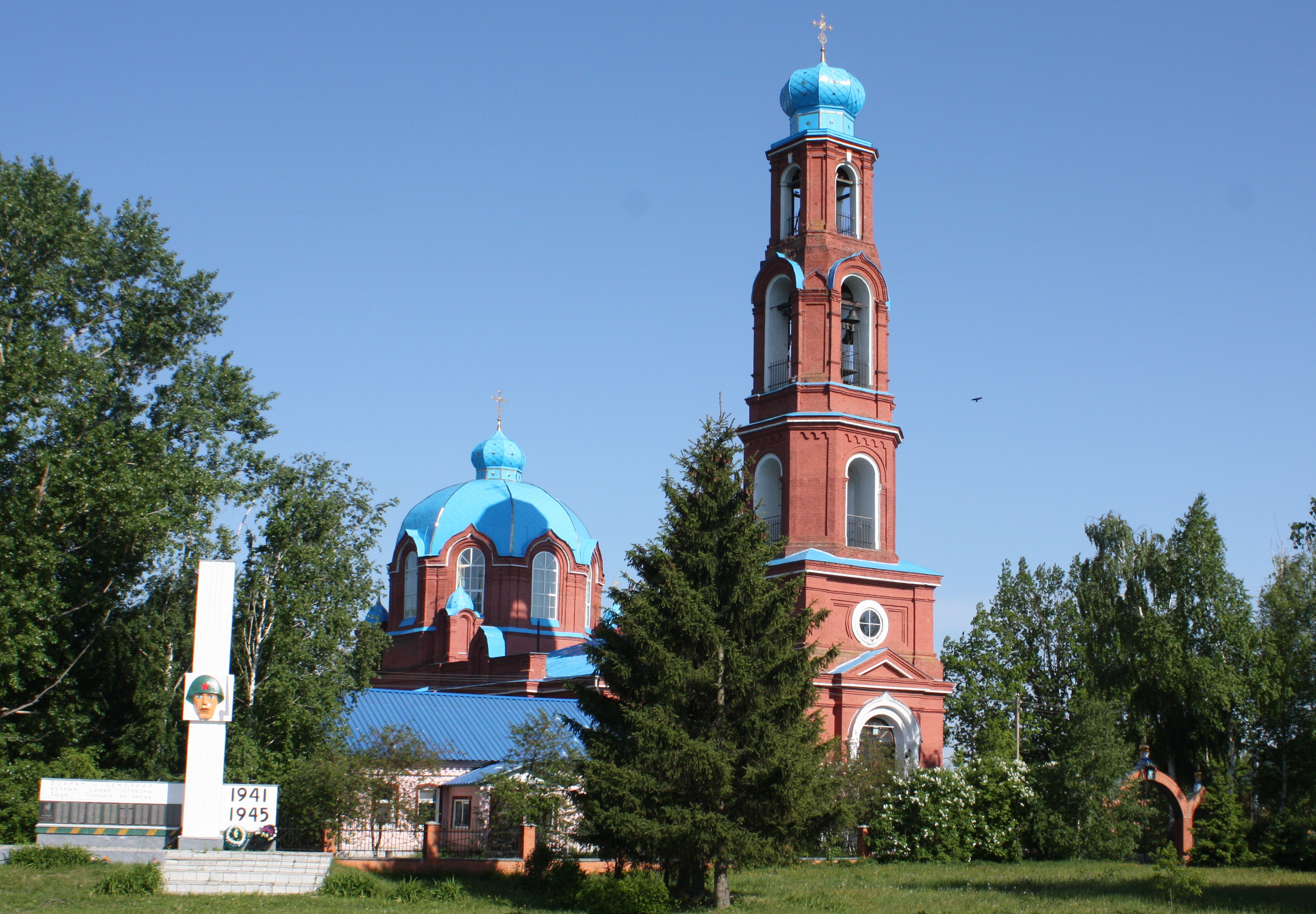 Казанская церковь: Александровка, Ухоловский район, Рязанская область